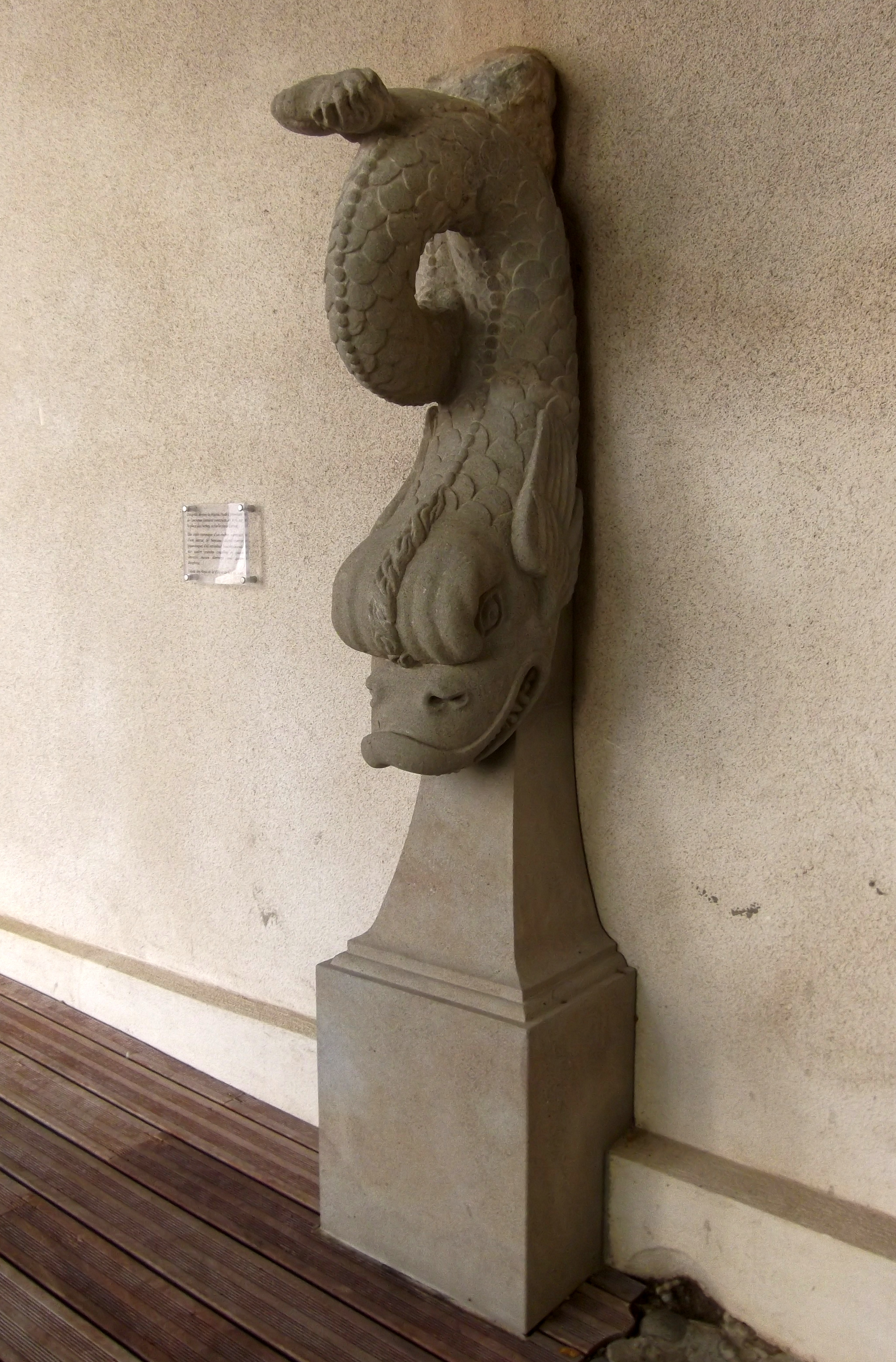 Dauphin en grès de Pezens provenant de l'ancienne fontaine monumentale construite en 1676 sur la place Carnot à Carcassonne